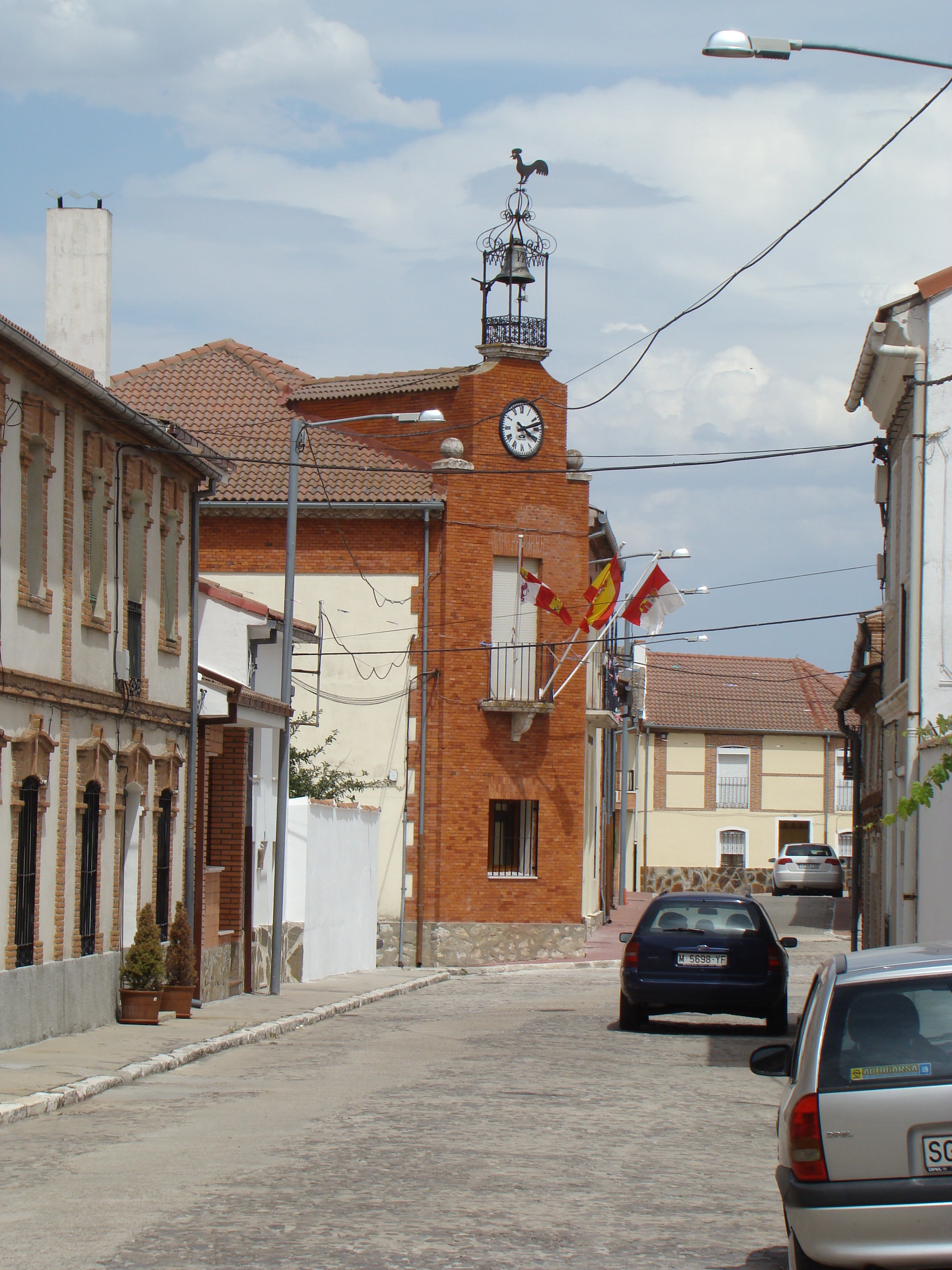 Ayuntamiento del municipio segoviano de Samboal (España).